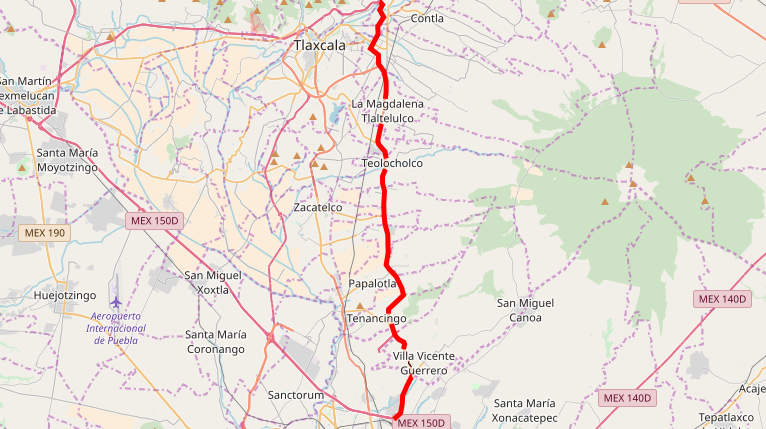 Un mapa del trayecto de la Carretera Federal 121 (Puebla-Santa Ana Chiautempan) o Vía Corta